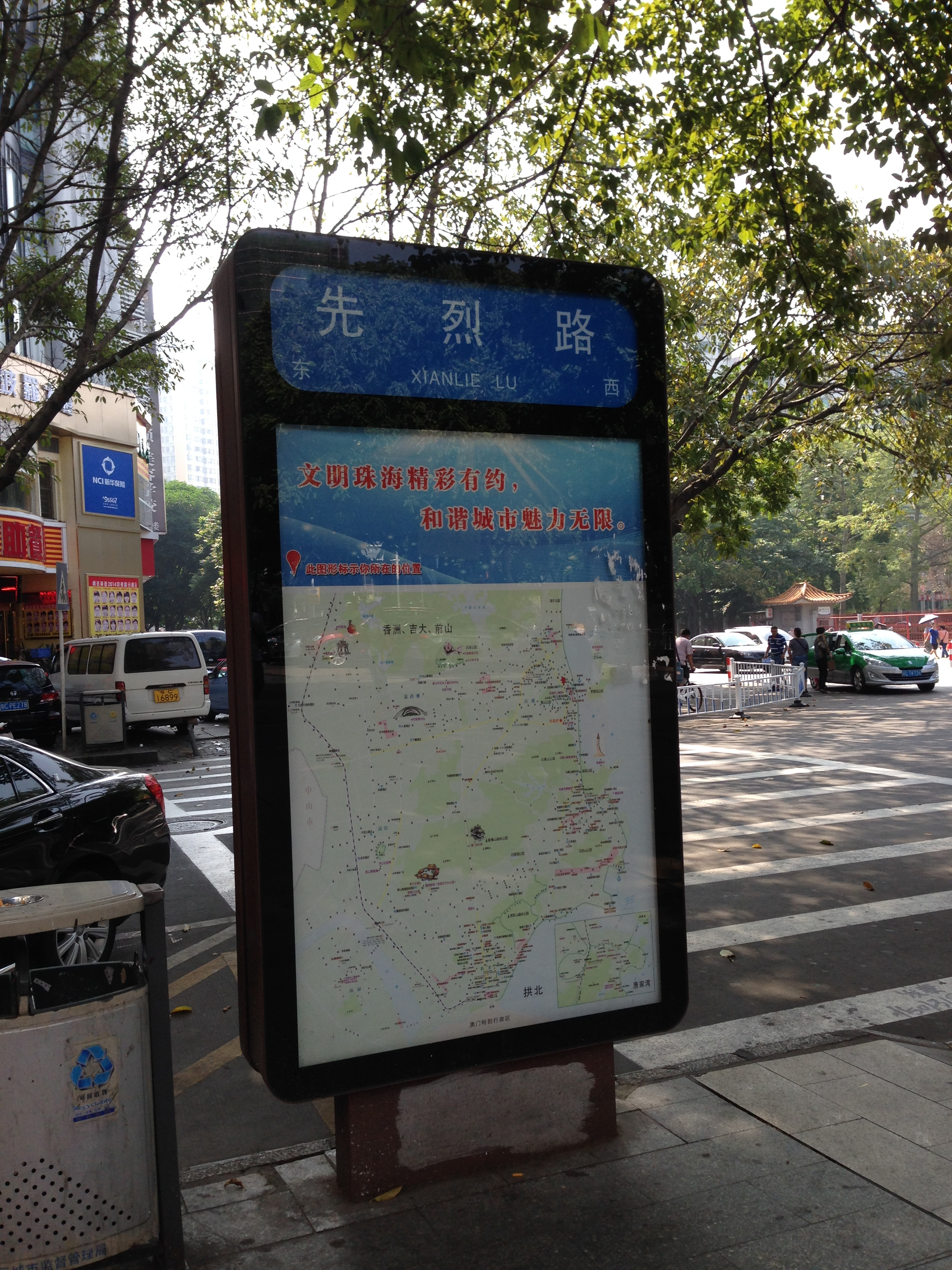 珠海先烈路